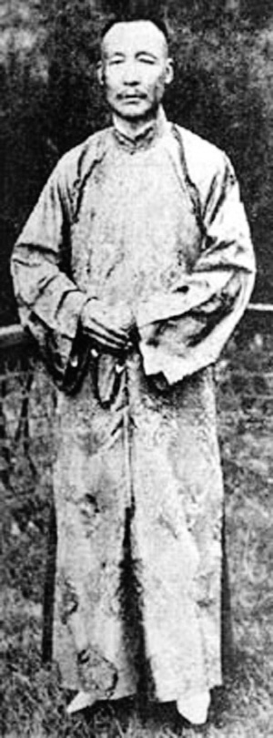 孙传芳遇刺前的照片